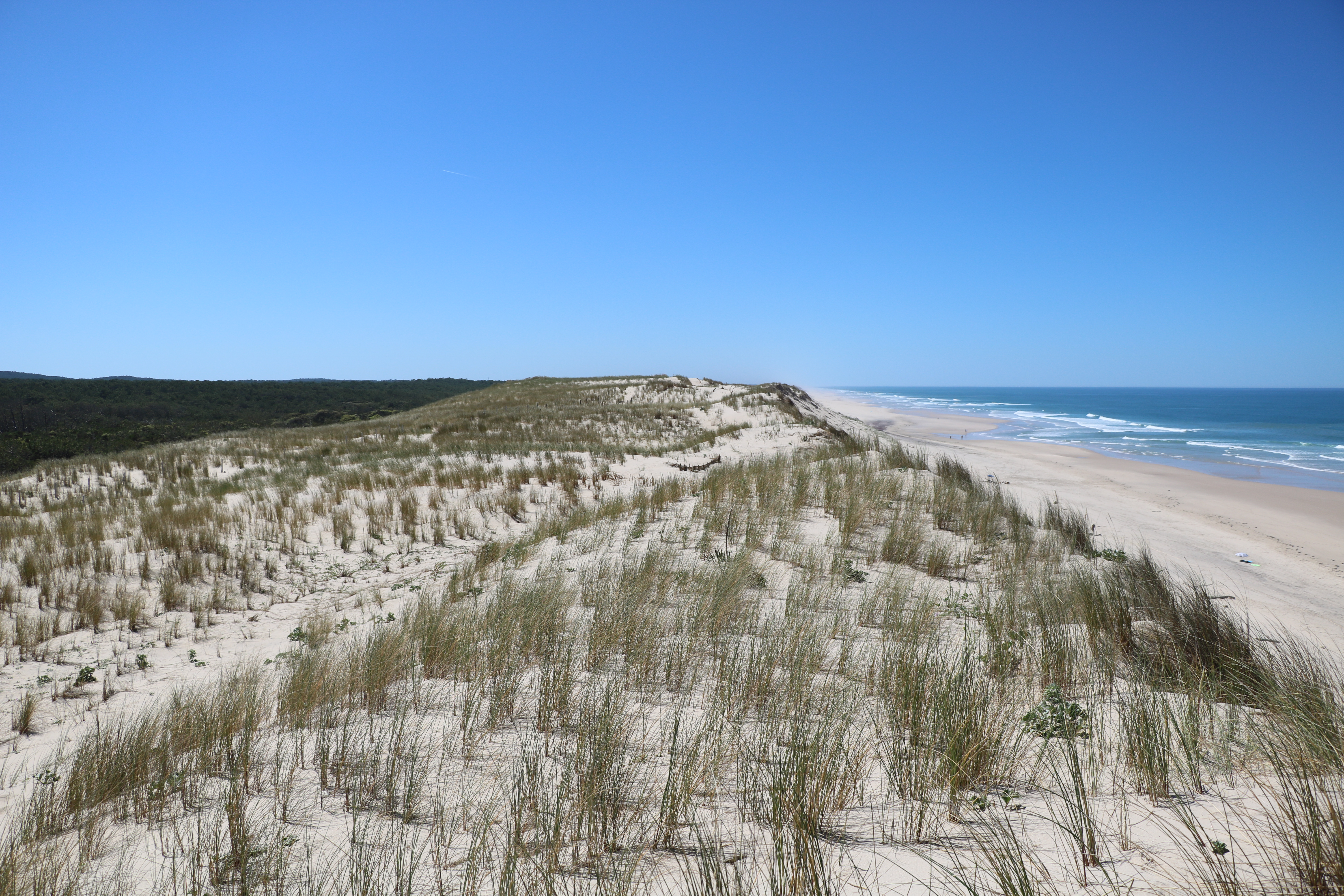 La réserve naturelle des dunes d'Hourtin englobe la plage, la forêt domaniale et la forêt communale d'Hourtin et s'étend de la mer aux lacs arrière-dunaires.